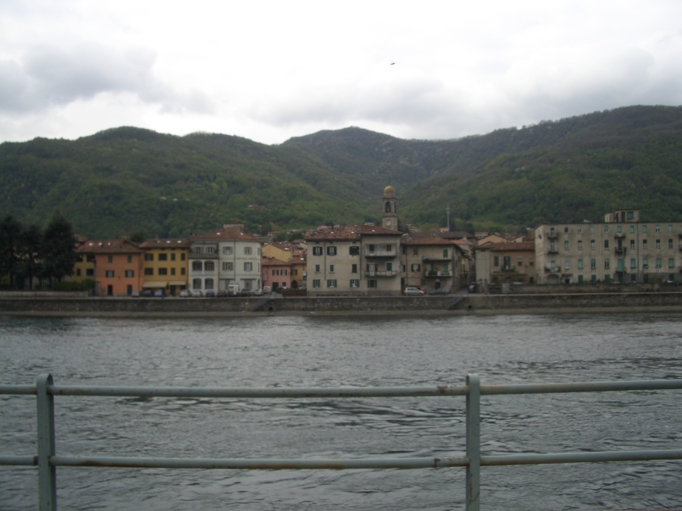 Panorama di Olginate.